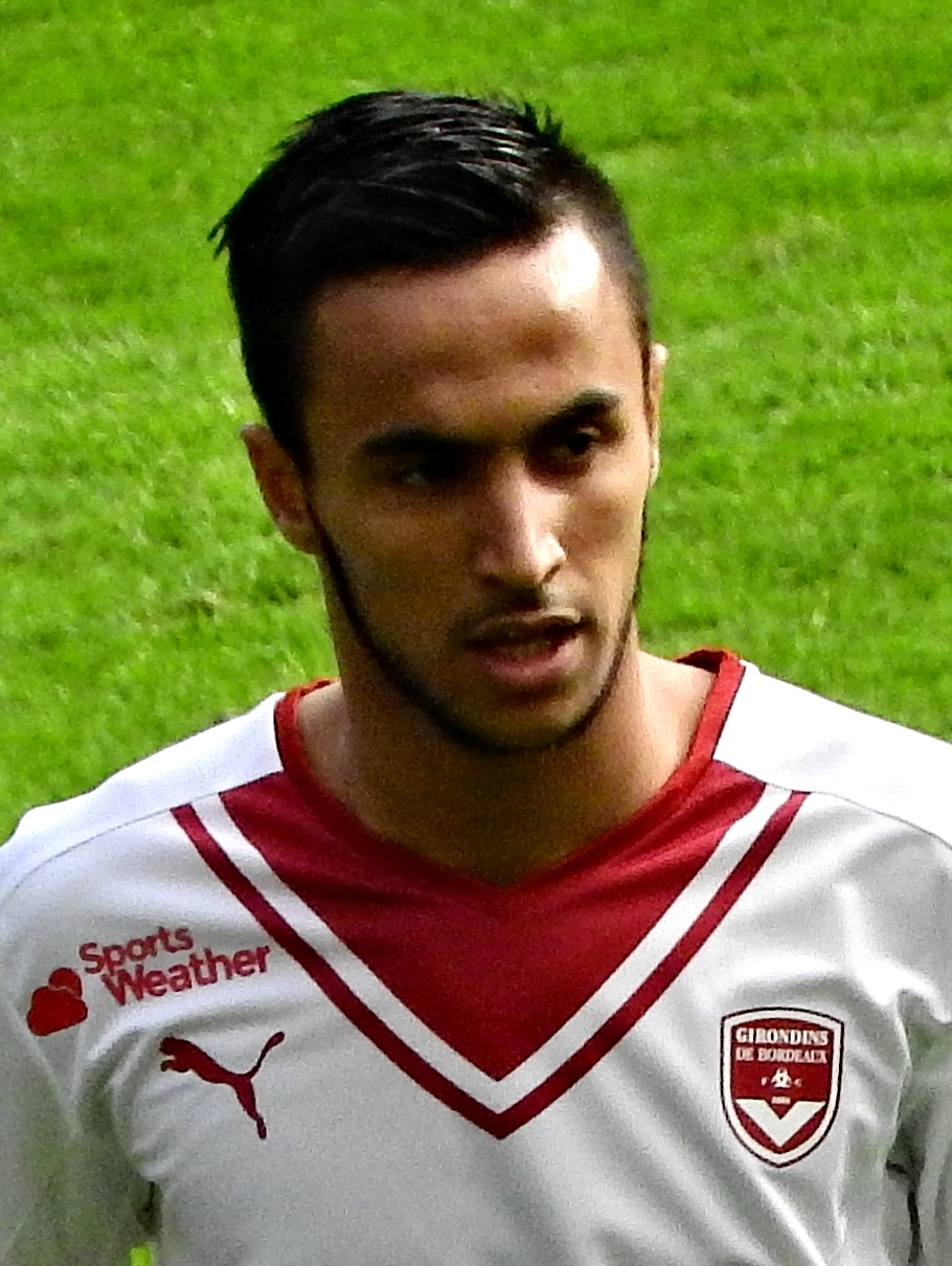 Adam Ounas lors de la rencontre opposant le Stade Rennais aux Girondins de Bordeaux le 16 octobre 2016 au Roazhon Park.